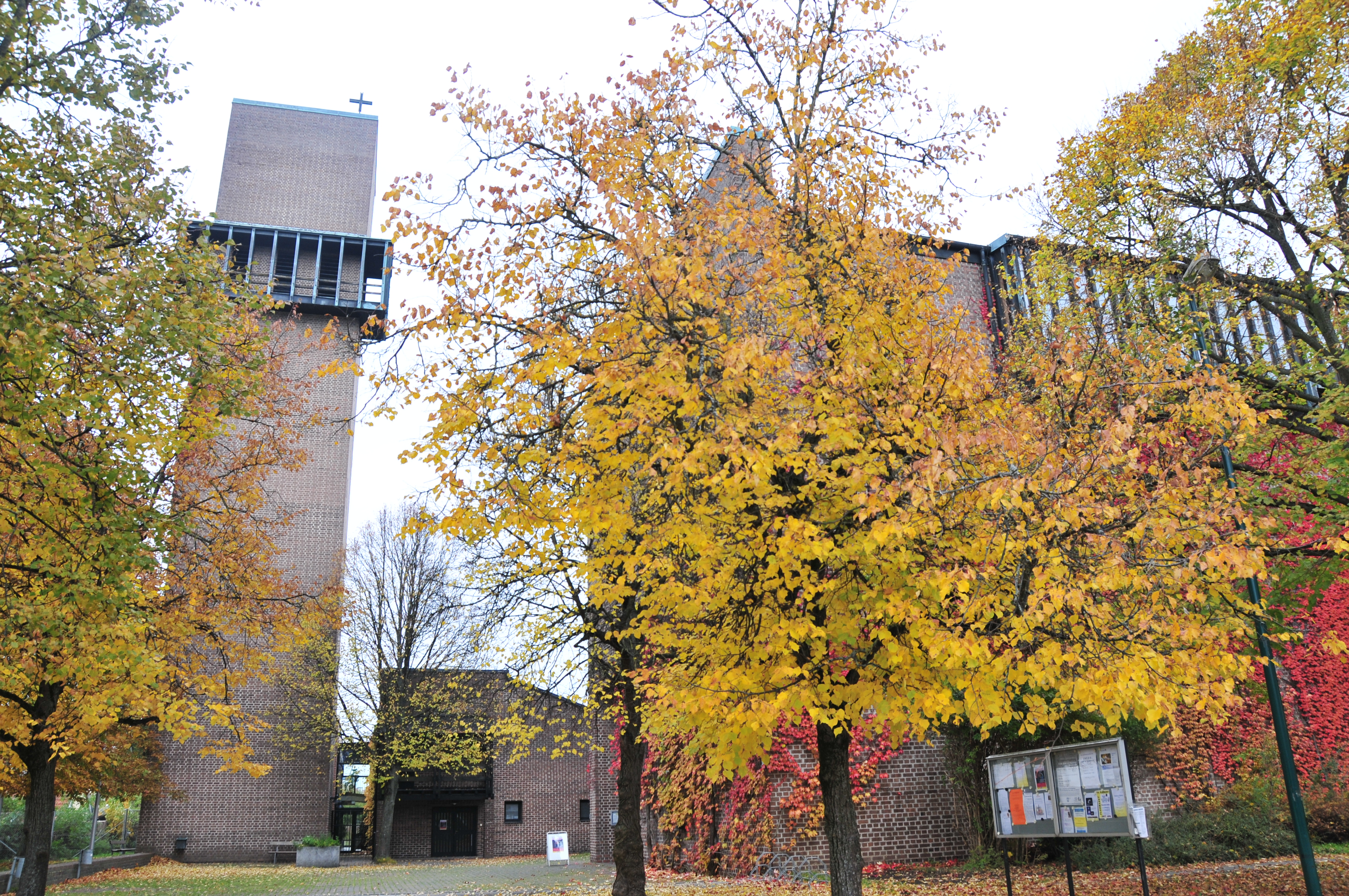 Pfarrzentrum St. Josef